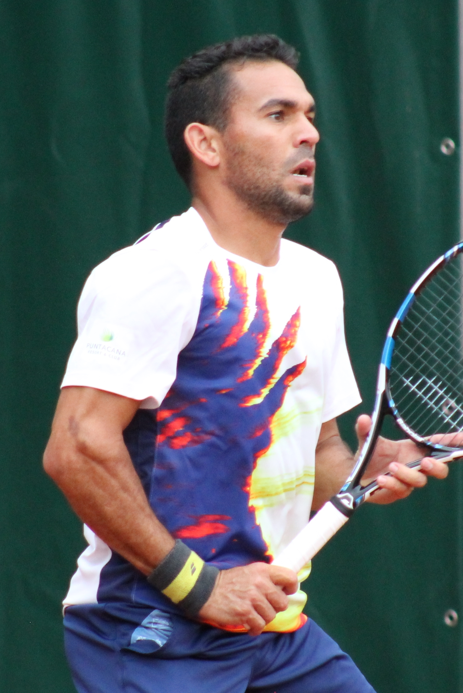 Estrella Burgos RG15 (10)